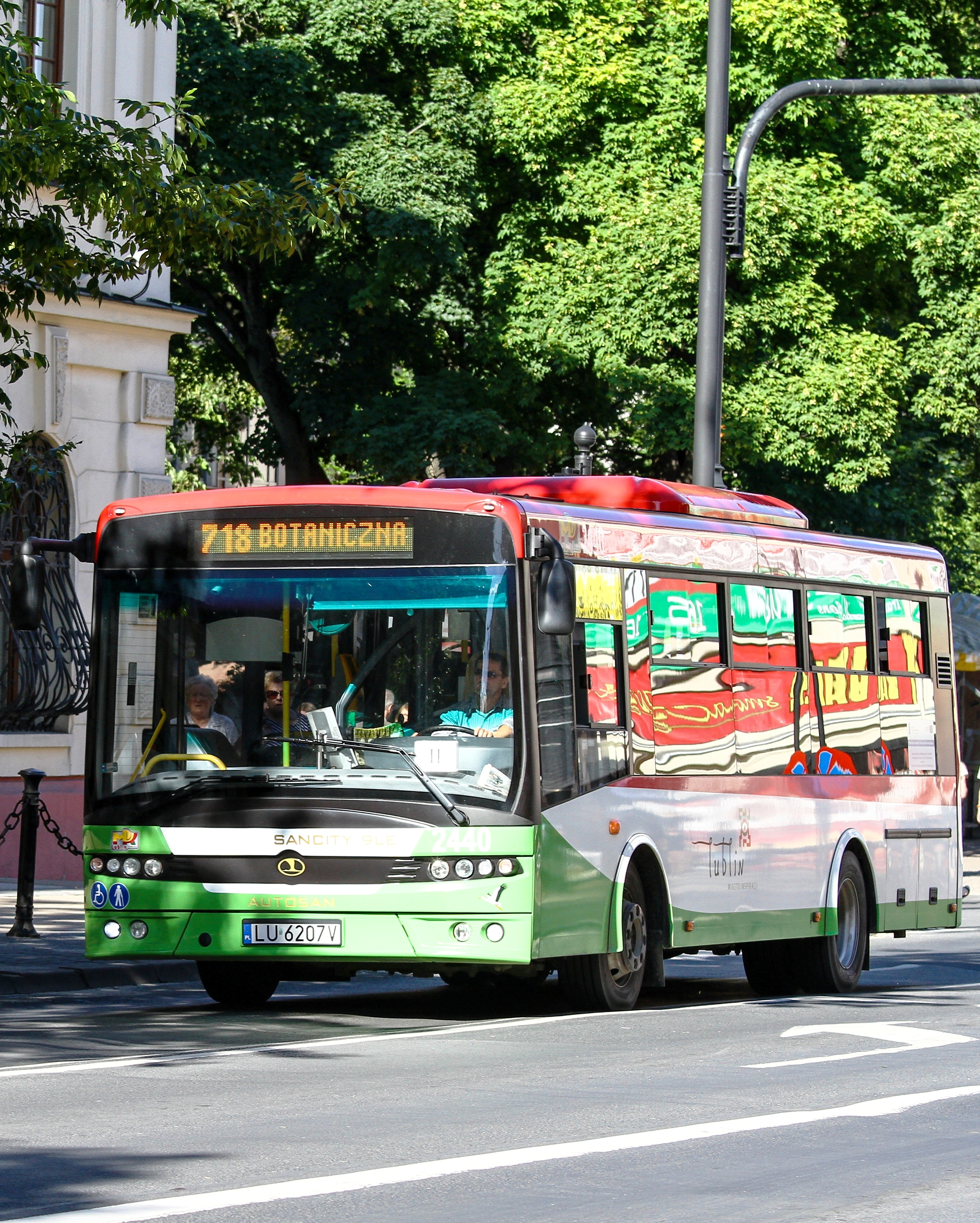 Autobus Autosan 9LE